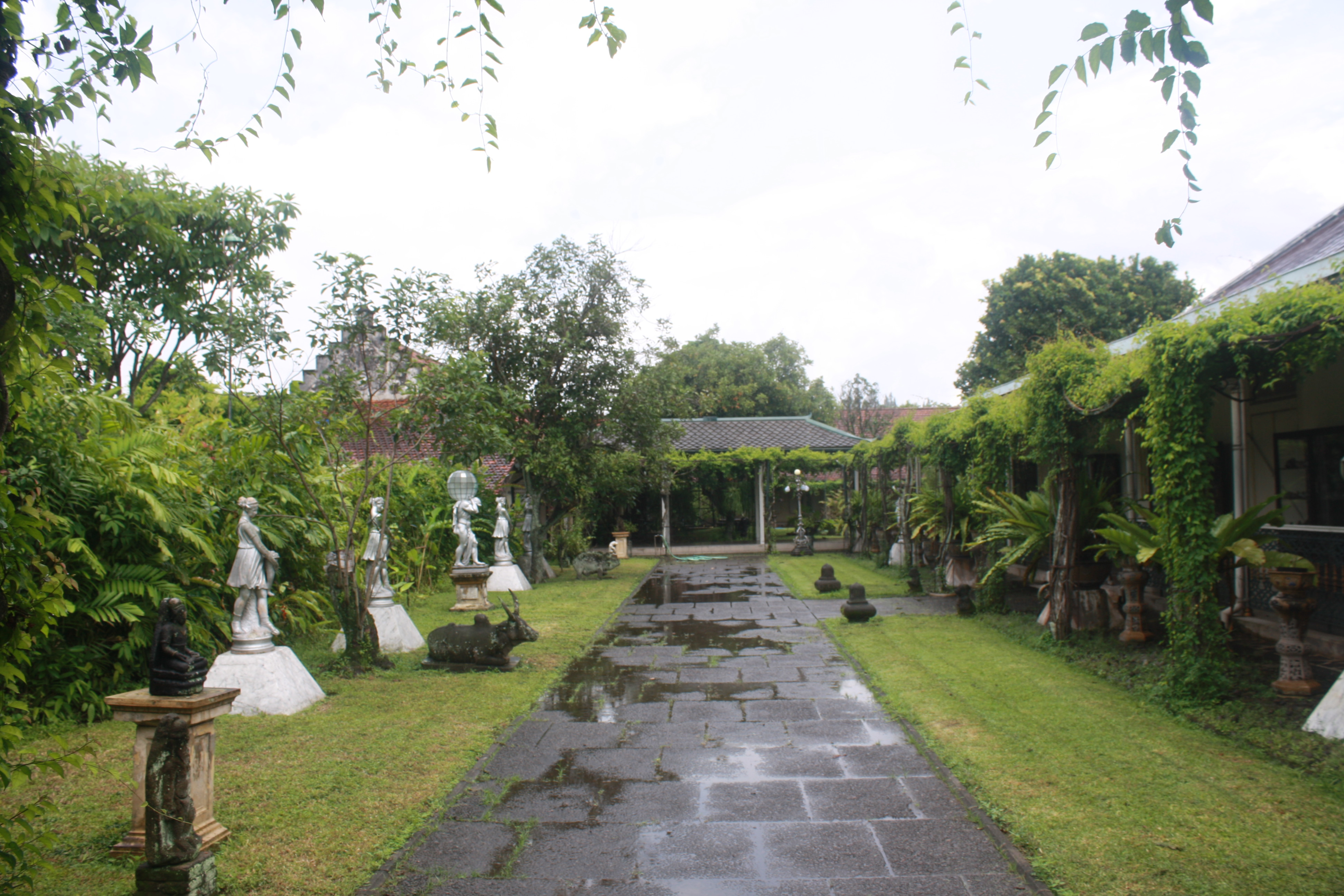 Salah satu sudut taman hijau di lingkungan bagian dalam Pura Mangkunegaran, Surakarta.